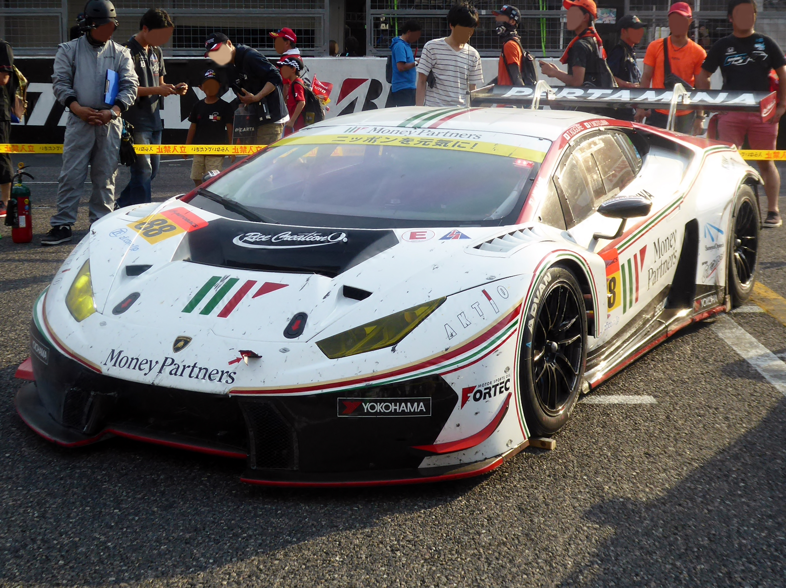 2019年鈴鹿GT300km終了後の88号車マネパランボルギーニGT3を撮影。